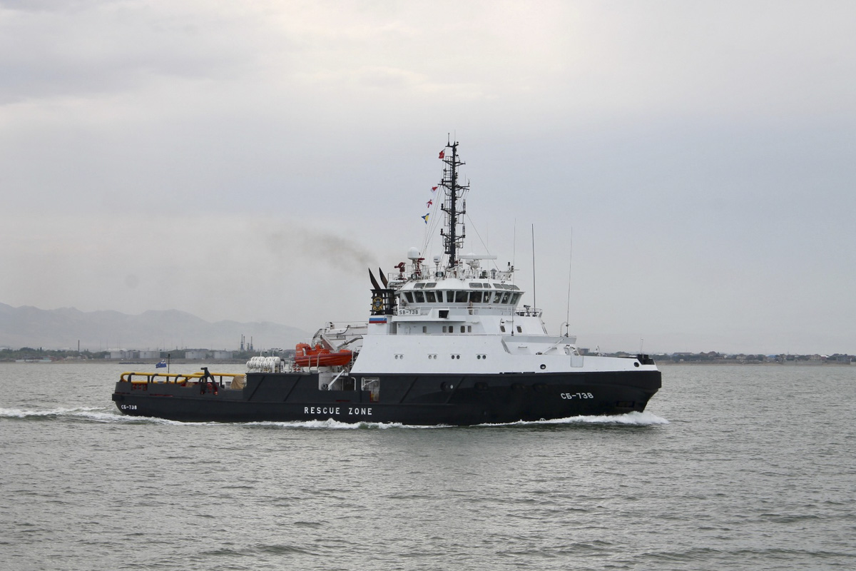 Спасательное буксирное судно «СБ-738» проекта 22870 построено в Астраханском филиале Центра судоремонта «Звездочка» для службы поисковых и аварийно-спасательных работ Военно-Морского Флота. Судно «СБ-738» принято в состав Каспийской флотилии.